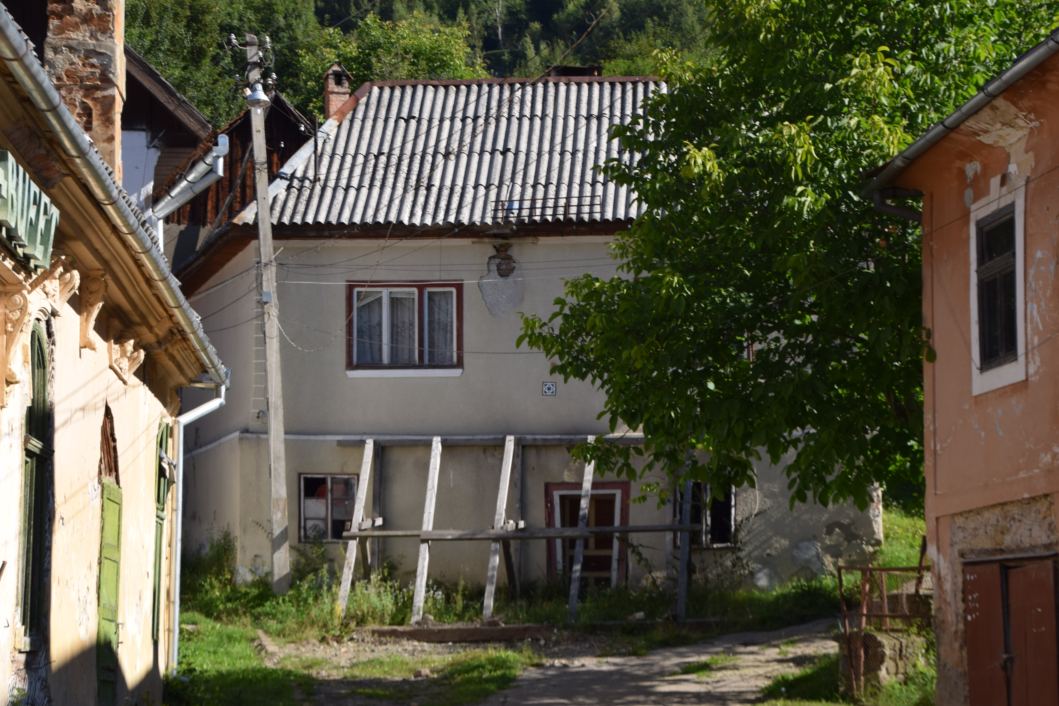 Casă, nr. 376 din Roșia Montană